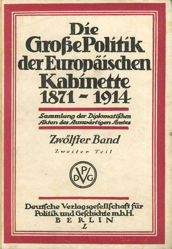 Umschlag von "Alte und neue Balkanhändel 1898–1899. Zweite Hälfte" (Die Große Politik der europäischen Kabinette 1871–1914, 12,2), Berlin 1922